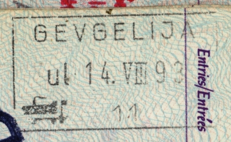 Passport stamp from Gevgelija